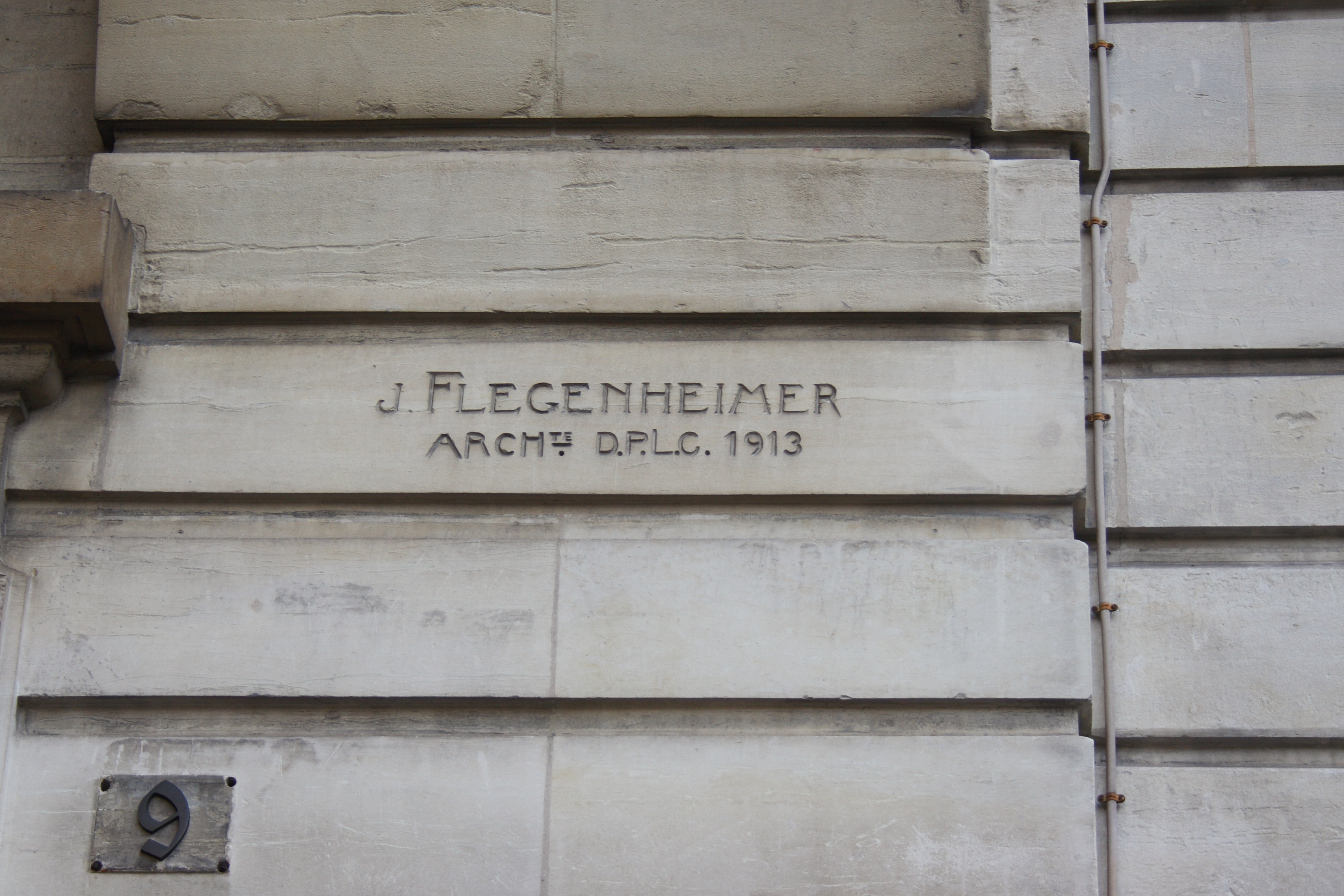 Gebäude 9, rue Huysmans im 6. Arrondissement von Paris, Signatur des Architekten: J. Flegenheimer Archte D.P.L.C. 1913